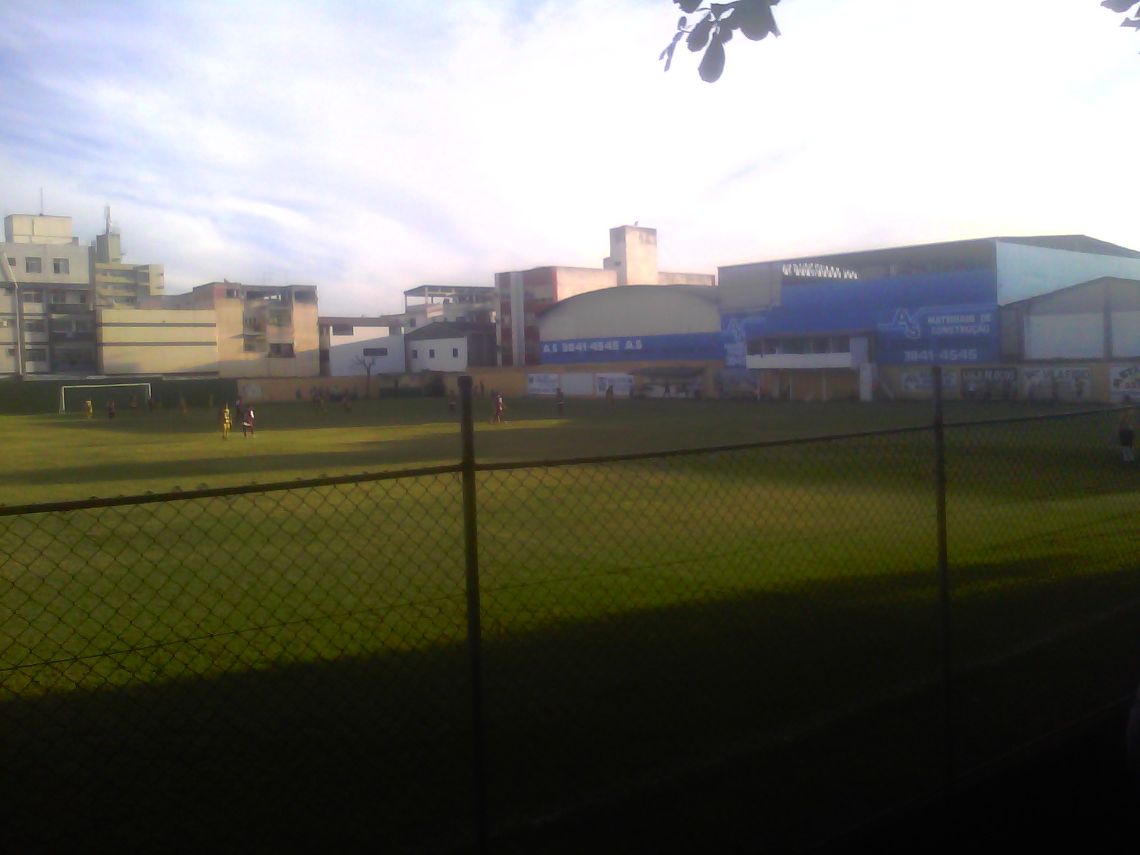 Foto tirada do campo do Estádio Gil Bernardes da Silveira, em Itapoã, Vila Velha-ES (BRASIL), durante a partida entre GEL x Desportiva Ferroviária, válida pela Segunda Divisão do Campeonato Capixaba de 2012.